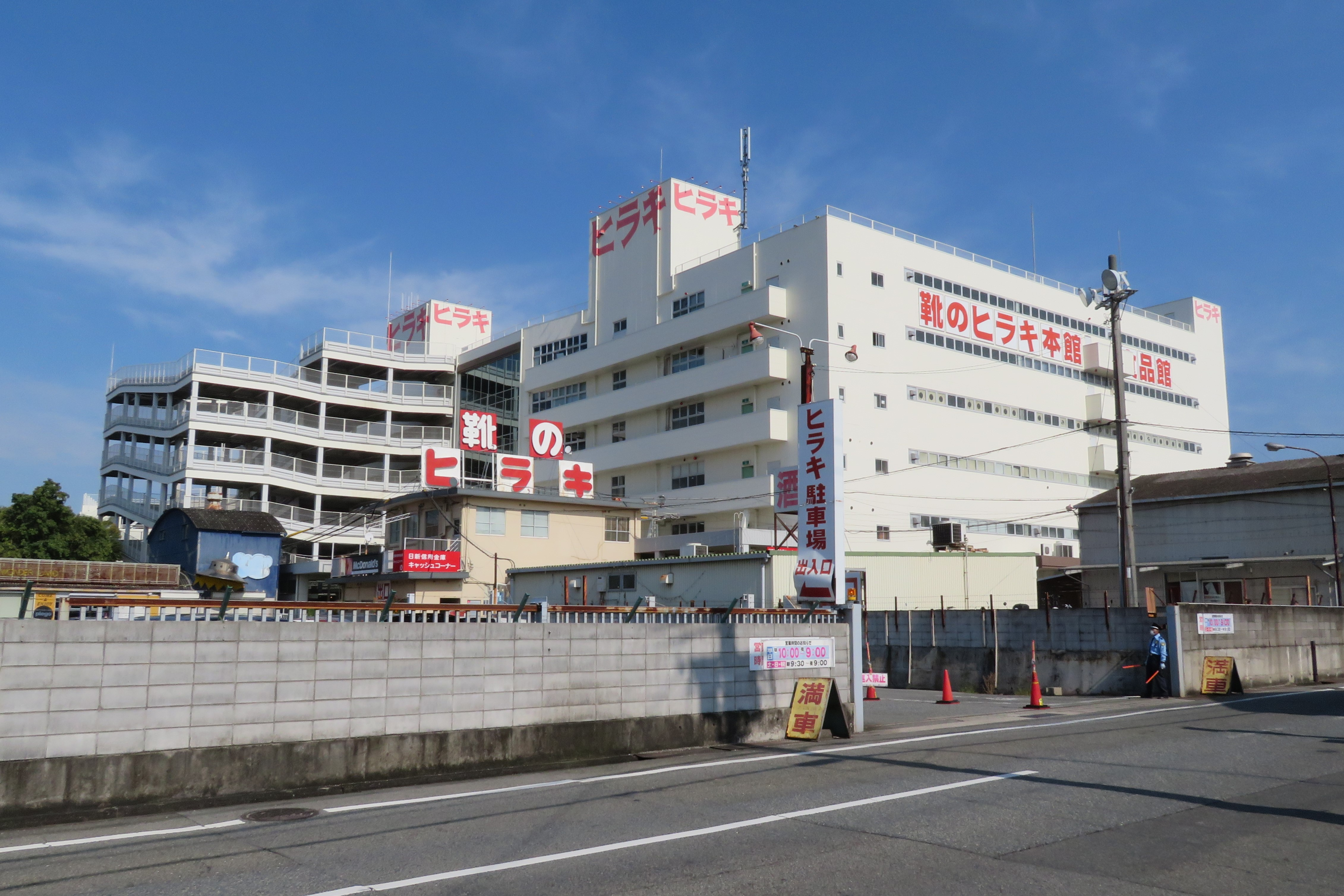 ヒラキ本社（ヒラキ岩岡店）